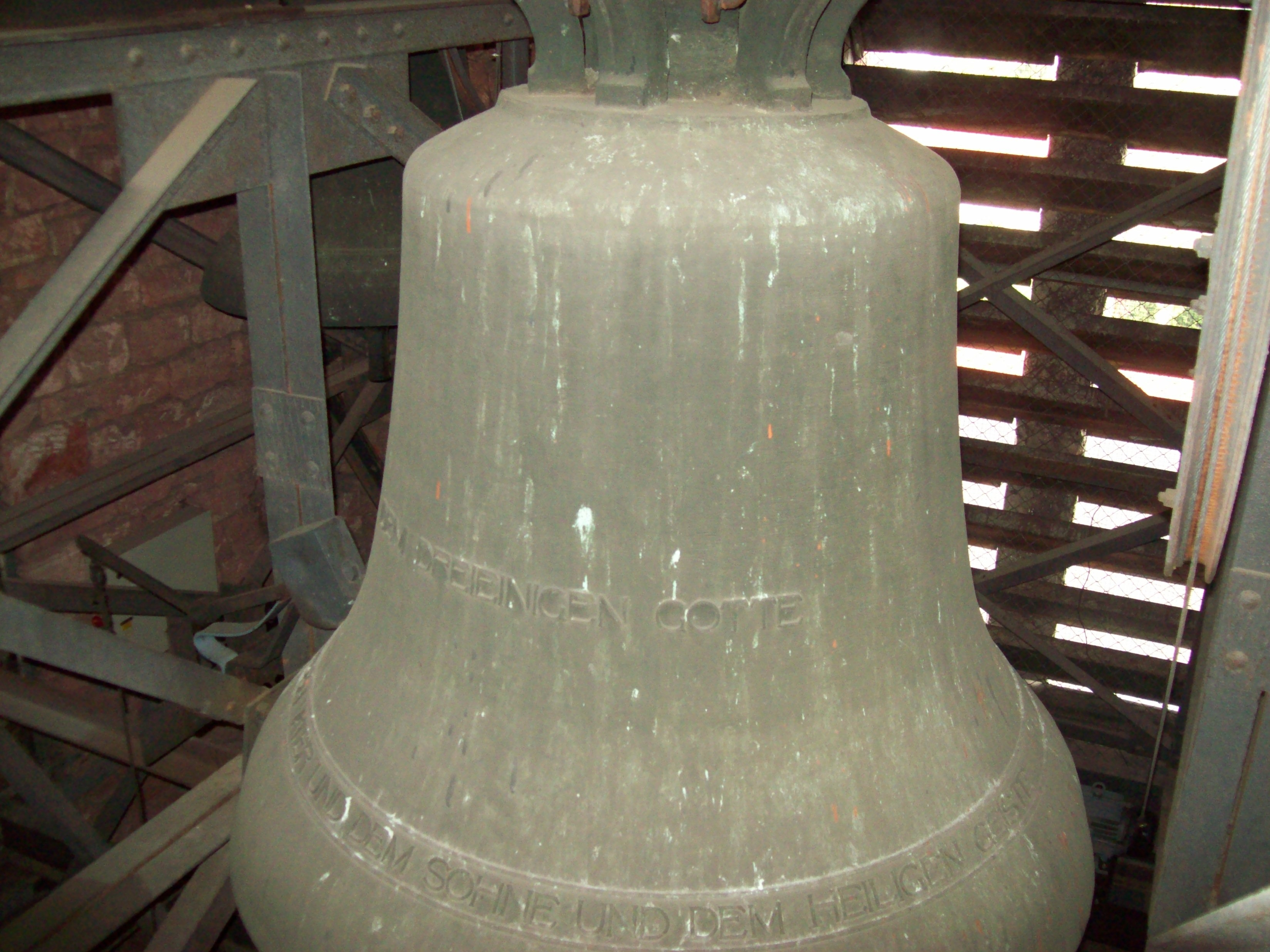 St. Laurentius Aschaffenburg Leider - Glocke 1, Dem Dreieinigen Gotte „Ehre sei dem Vater und dem Sohne und dem Heiligen Geiste“ (cis)